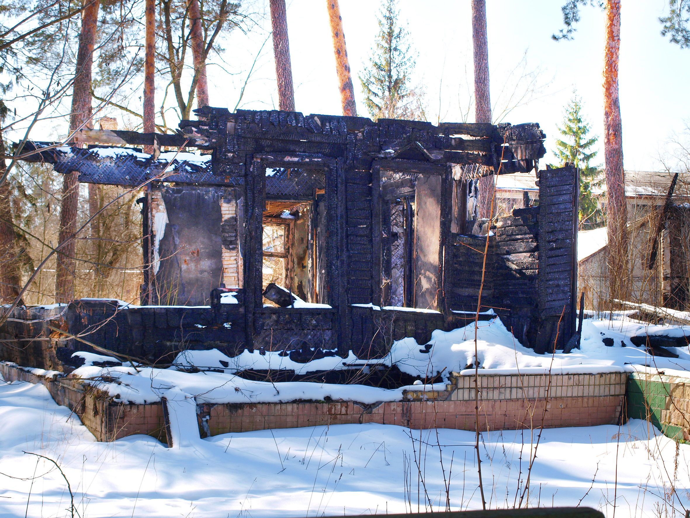 Дача 1910 р. У будівлі розміщувалася бібліотека. У грудні 2012 р. знищена пожежею. Максименка Федора вул. (Пуща-Водиця), 9